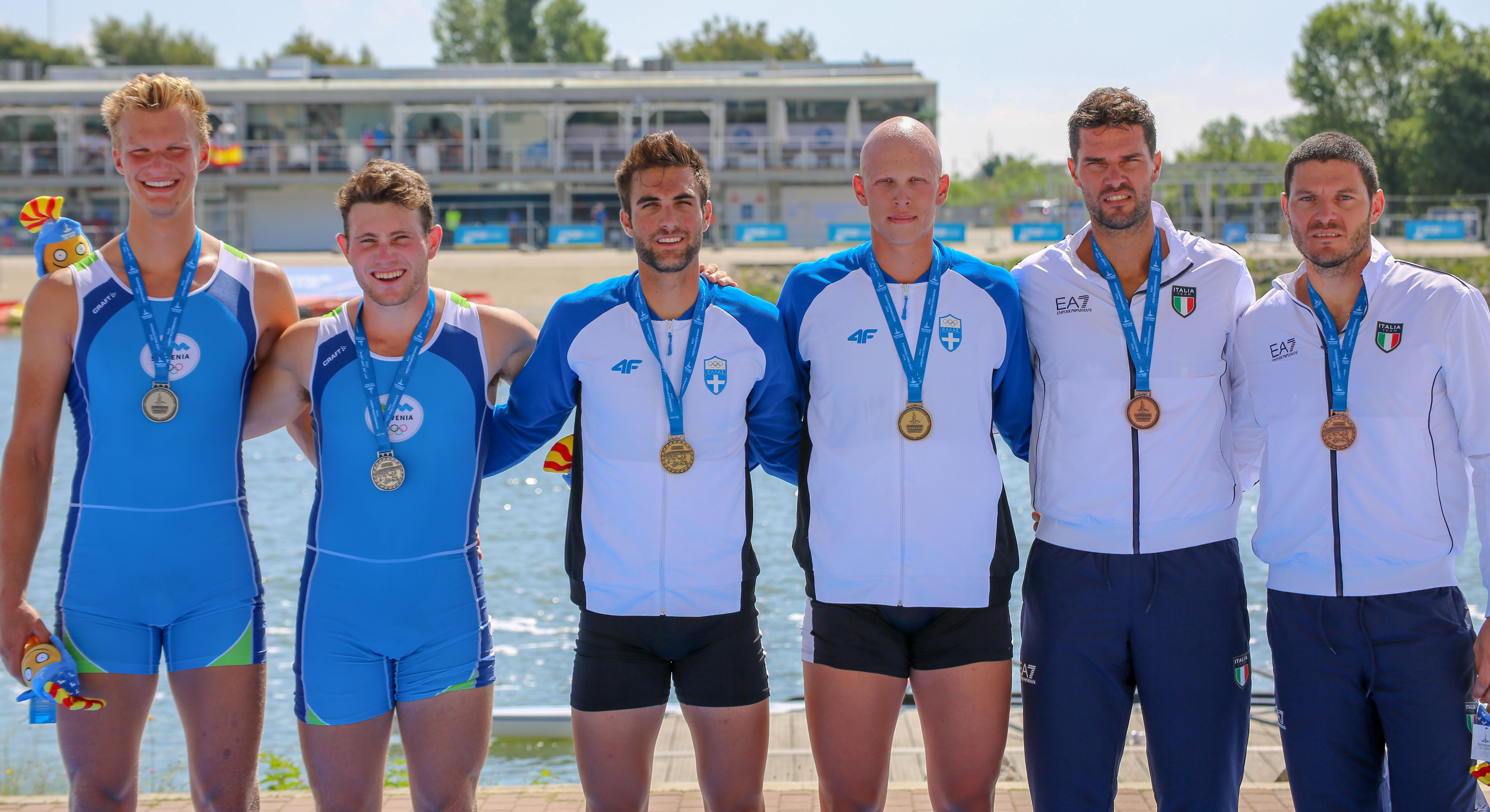 Medallistas del M2x en los Juegos del Mediterráneo 2018